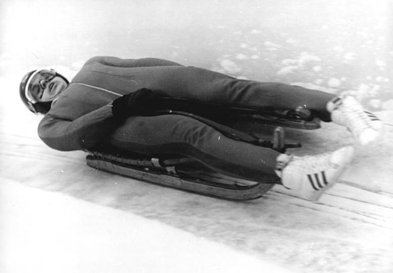 Hans Rinn ADN-ZB Mittelstädt 27.1.1974-Oberhof: DDR-Meisterschaften im Rennschlittensport-DDR-Rennschlittenmeister 1974 und damit erfolgreicher Titelverteidiger bei den Herren wurde am 27.1.1974 auf der künstlich vereisten Bahn in Oberhof der Weltmeister Hans Rinn vom ASK Oberhof. Foto von einem früheren Wettkampf!